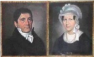 Moses und Brendel Meyer-Wittgenstein ca. 1810